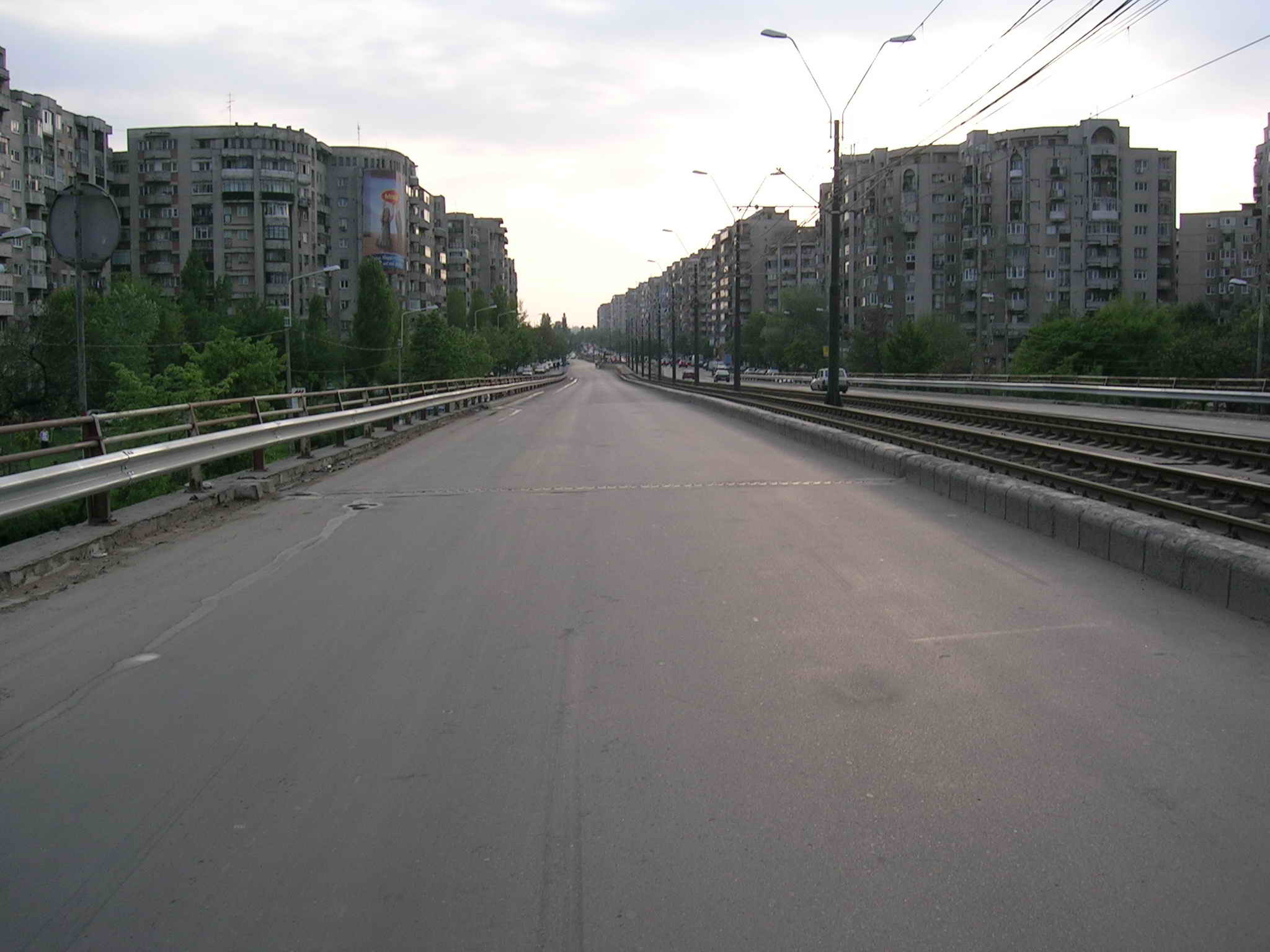 copyright bratu andrei